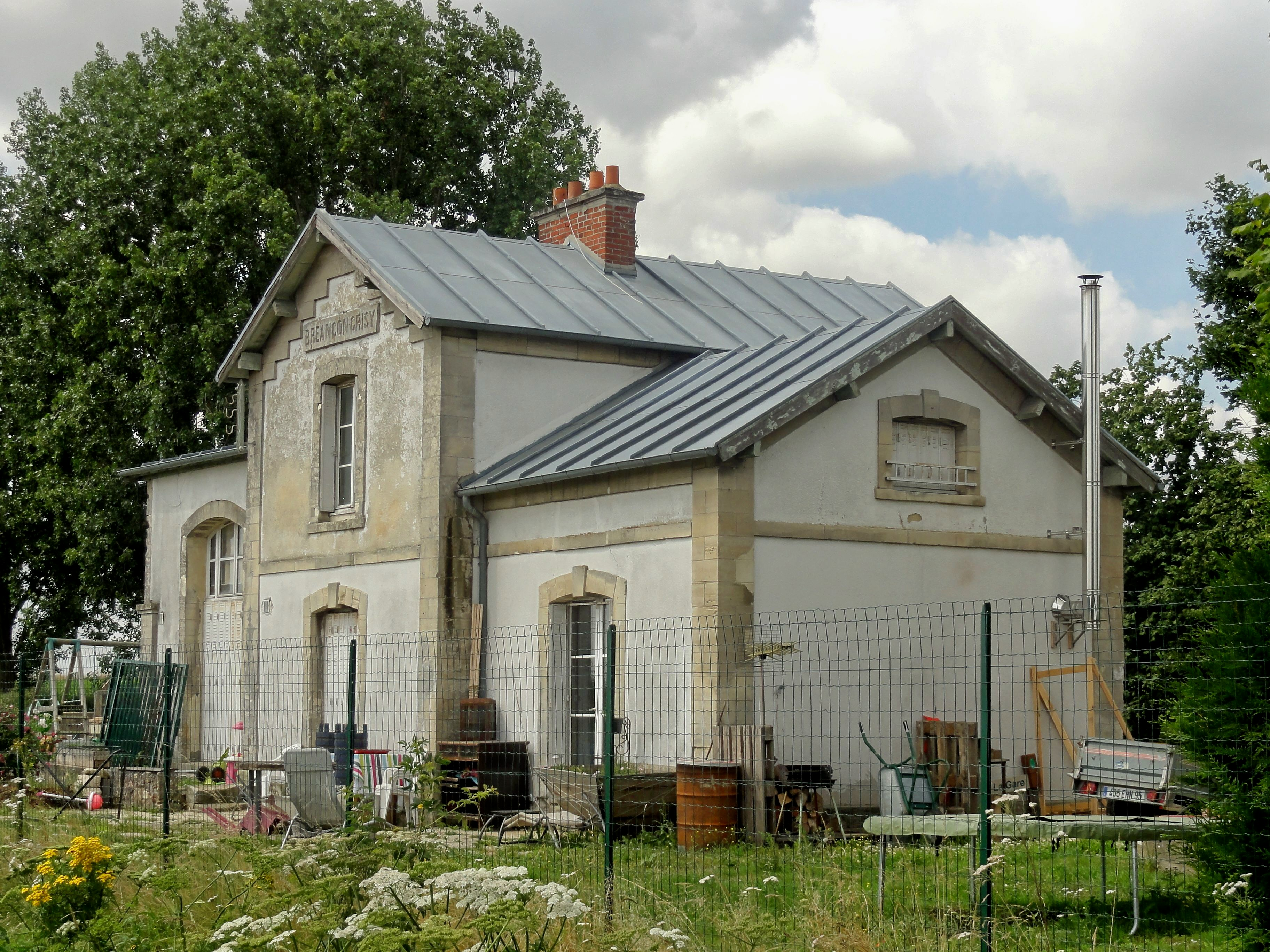 Ancienne gare de Bréançon - Grisy, côté voies, vue en diretion de Marines.